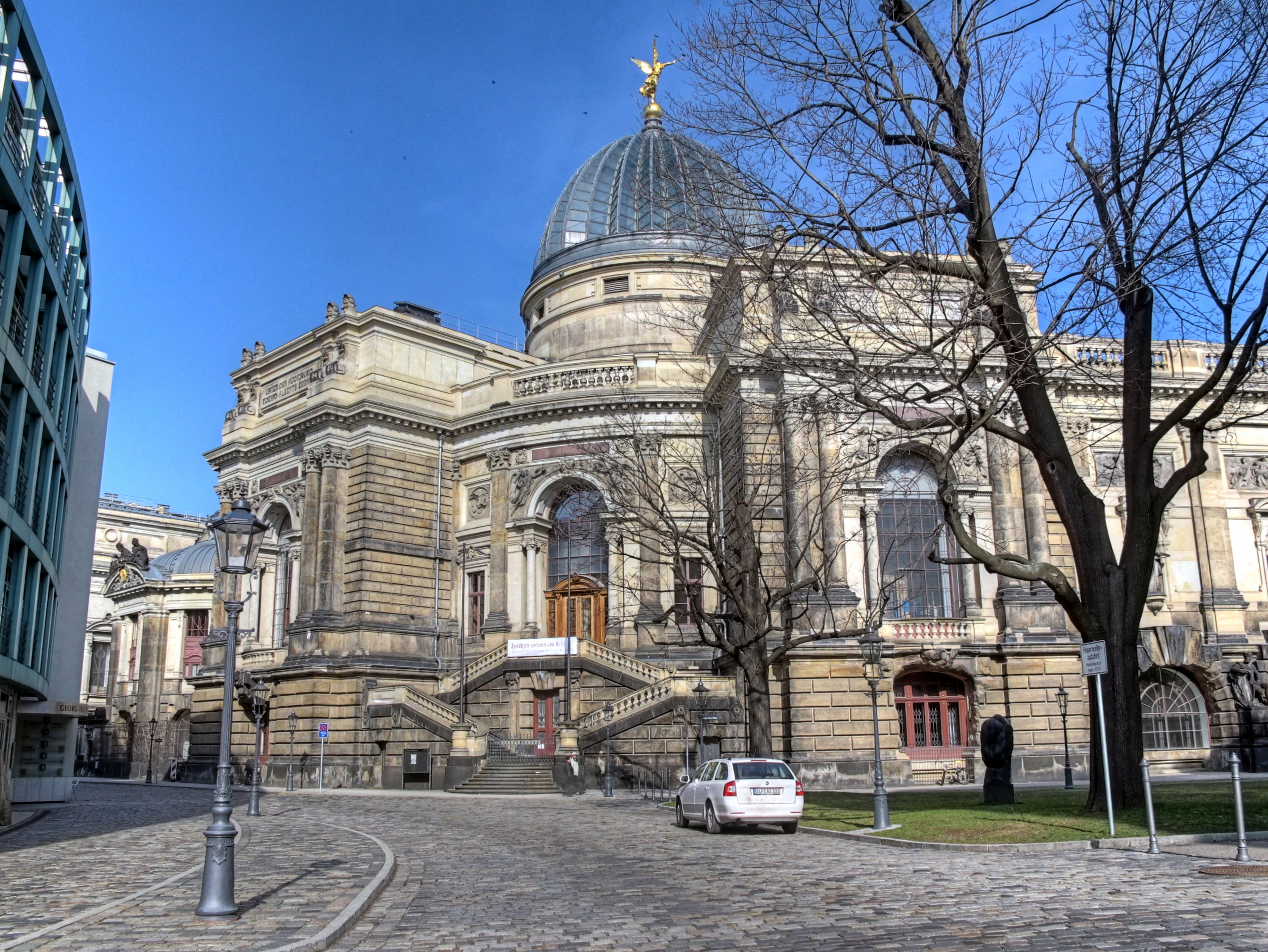 Deutschland, Sachsen, Dresden, Hochschule der bildenden Künste, Bühlsche Terrasse 1